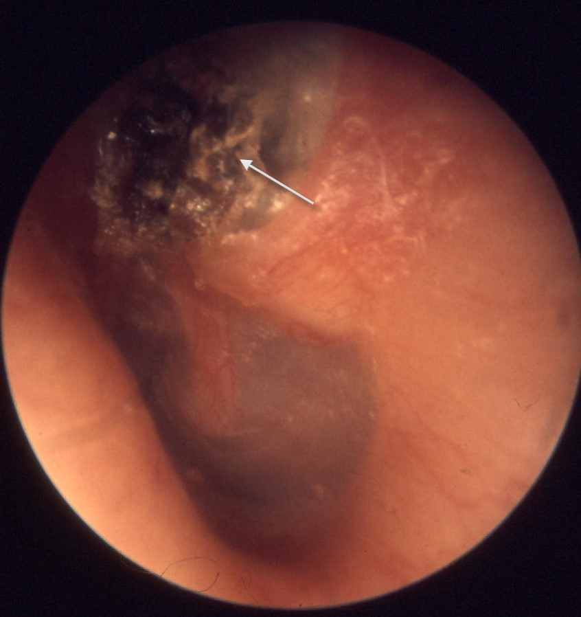 Česky: Uzávěr tuby cholesteatomem